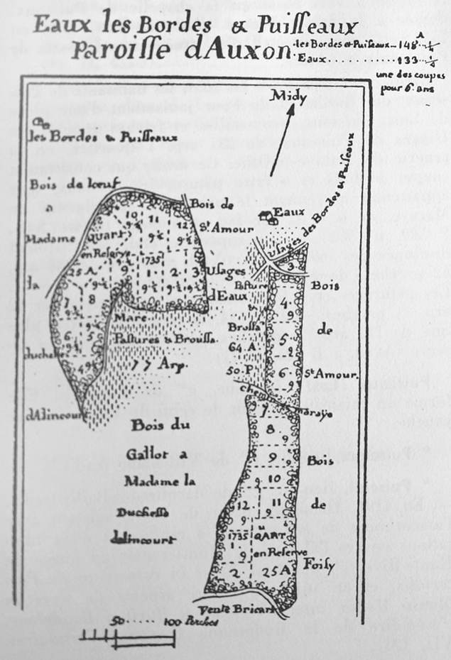 issue des archives.